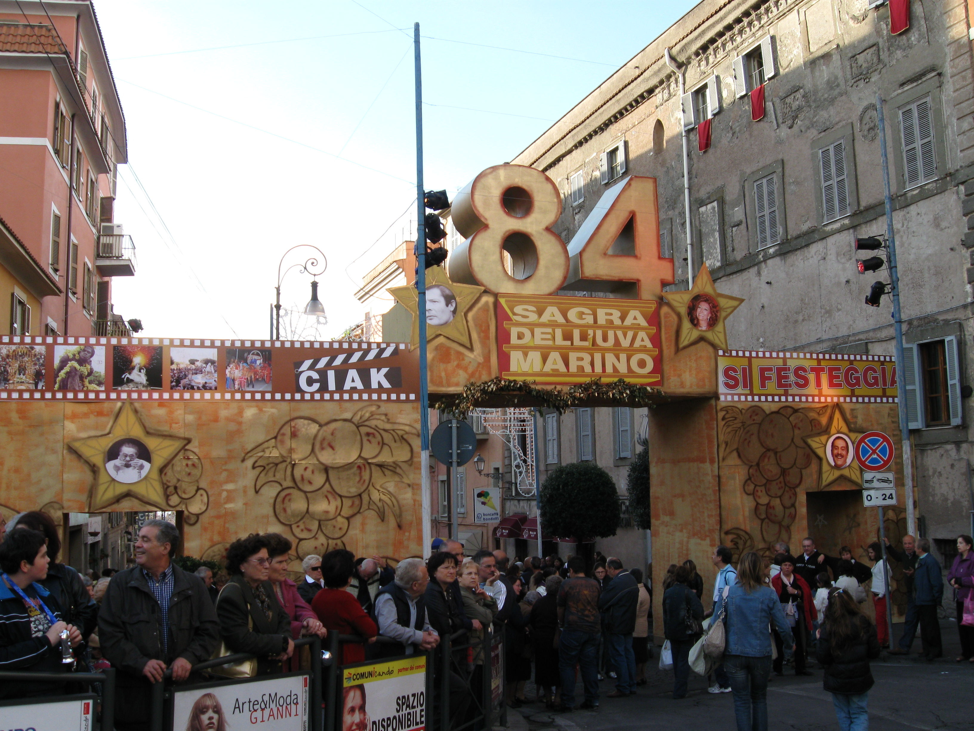 L'arco di cartongesso costruito per l'84^ Sagra dell'Uva (5 ottobre 2008) di Marino (RM)